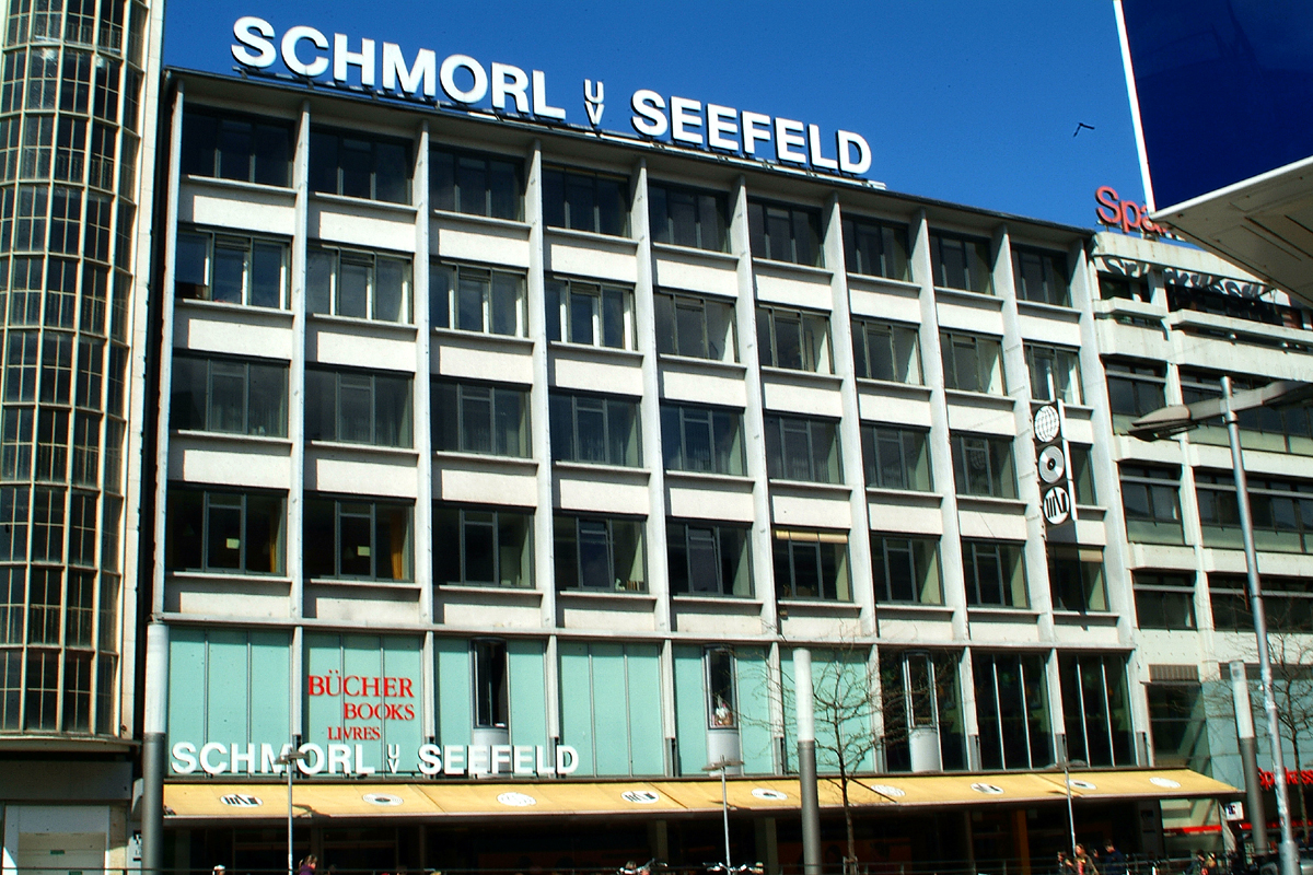 Sie haben ein besseres Bild? Sogar ein historisches Dokument als Bild(ungsförderung)? Zeigen Sie' s uns. Stiften Sie es doch auch - allen Menschen.